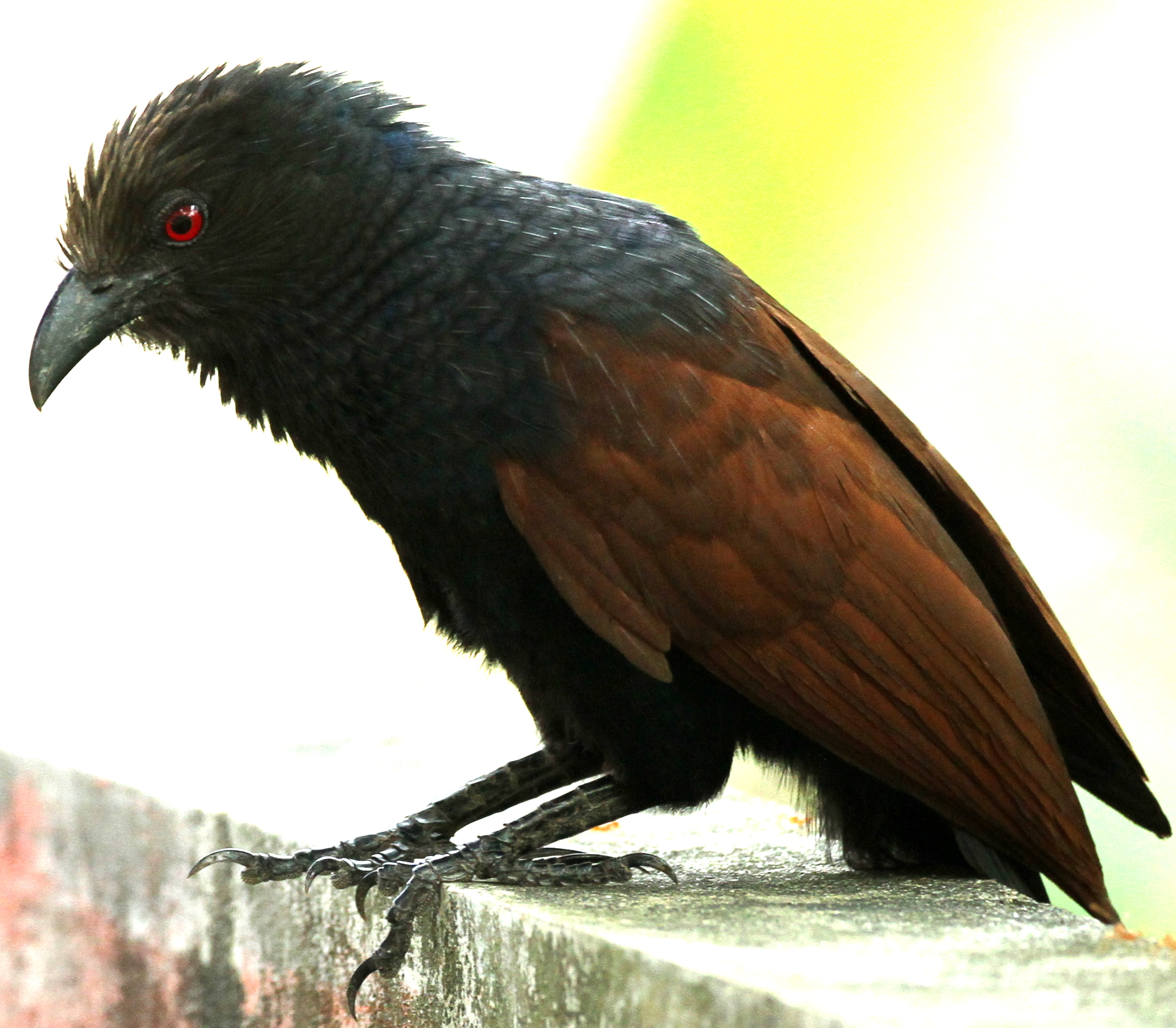 മതിലിൽ നിലയുറപ്പിച്ചിരിക്ക്ഉന്ന ചെമ്പോത്ത്. കോട്ടയം ജില്ലയിലെ അതിരമ്പുഴയി�